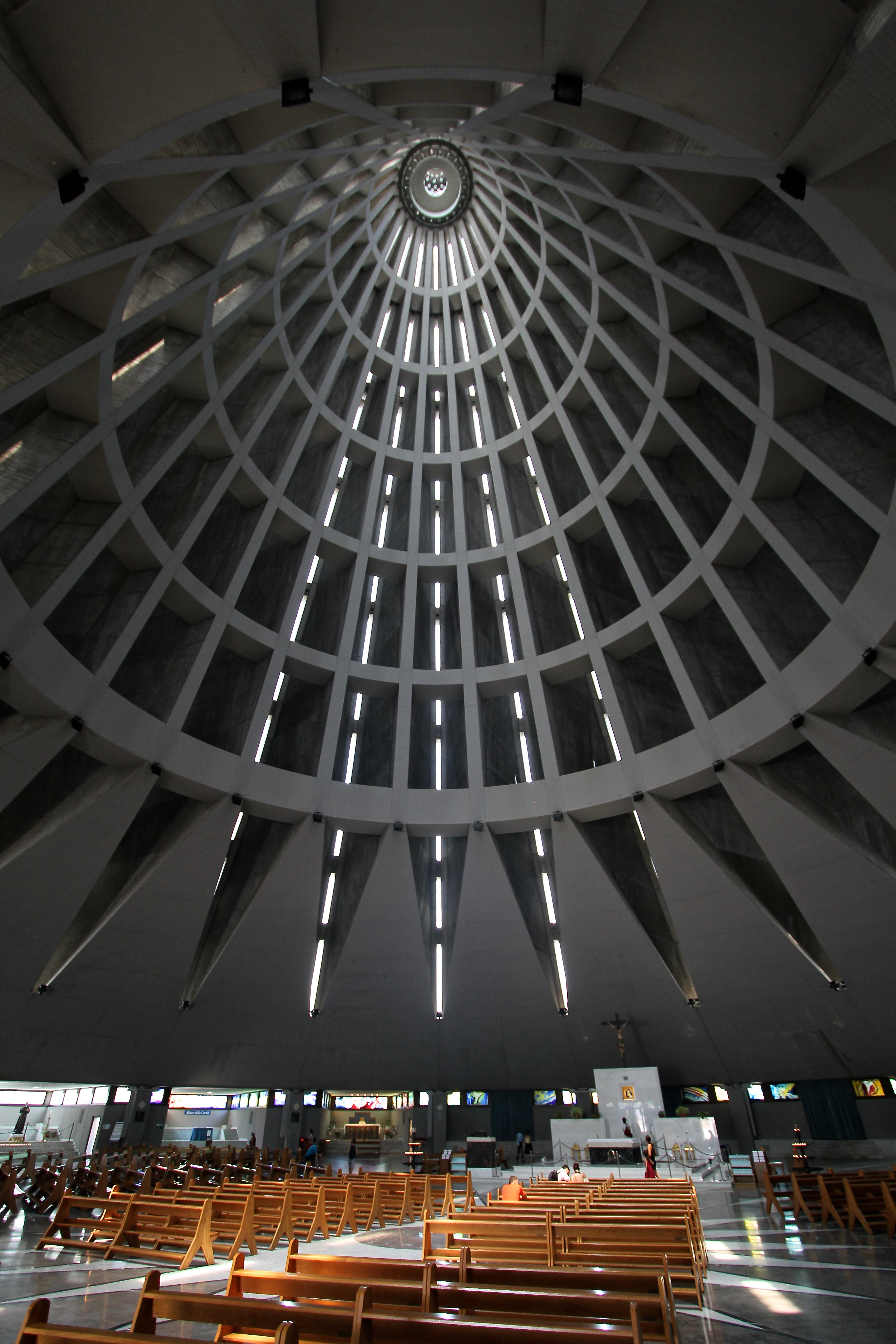 Santuario della Madonna delle Lacrime, Siracusa, Italy.